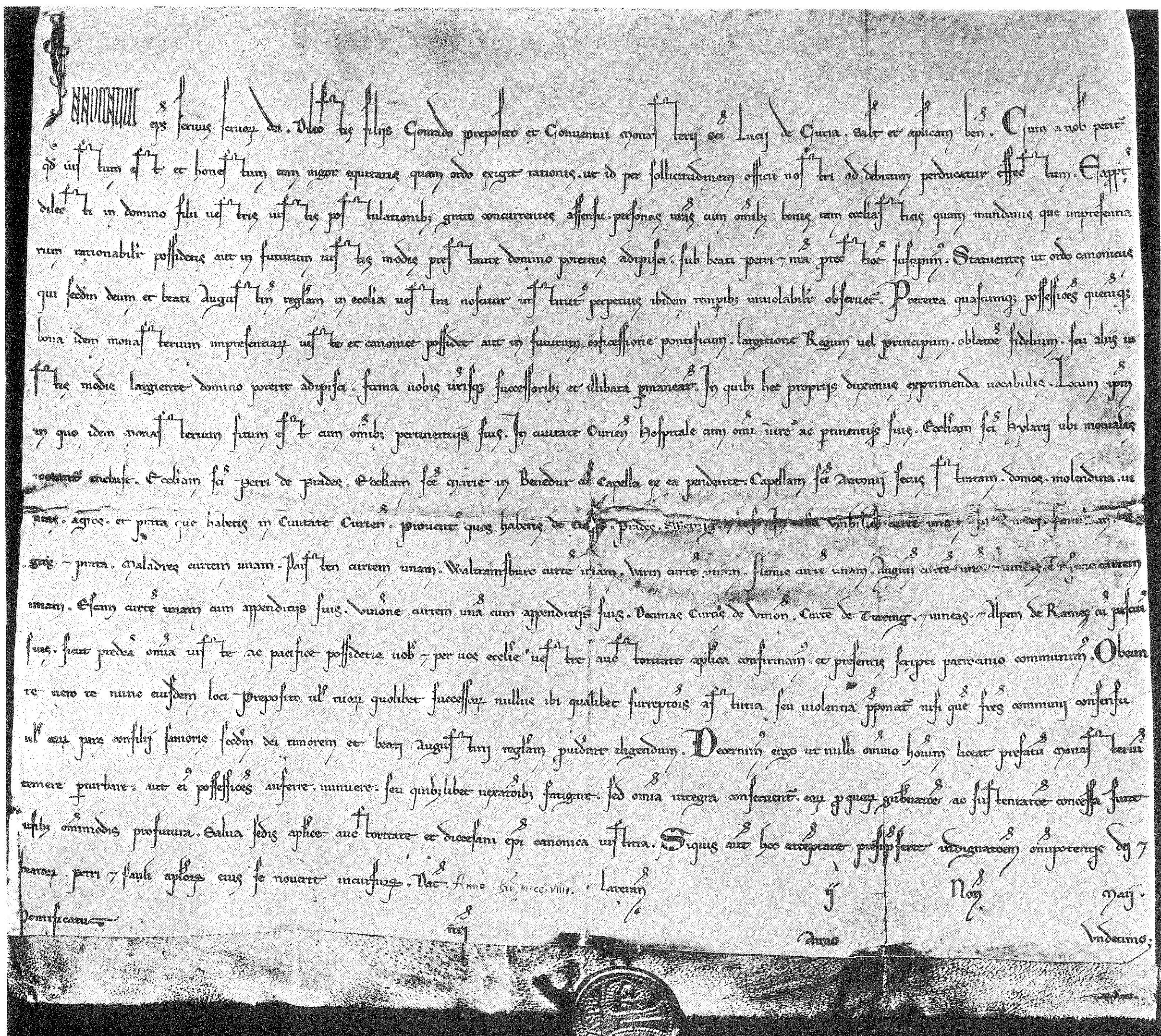 Litterae gratiosae di Innocenzo III (1208) conservata all'Archivio episcopale di Coira, da Franz Steffens, Paleographie latin, Champion, Parigi 1910, tav. 88, p. 364